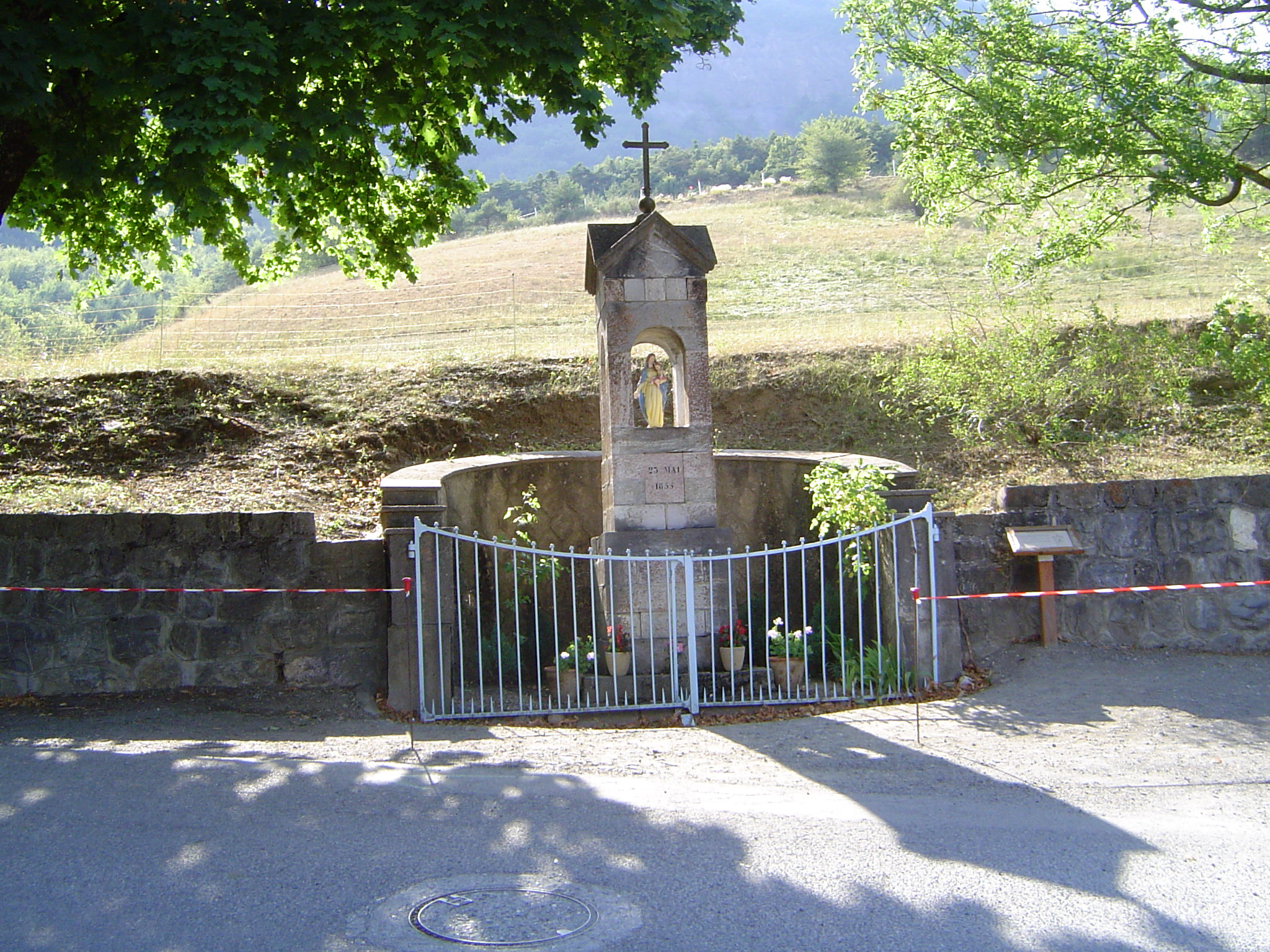 Photo prise à Notre-Dame-du-Laus